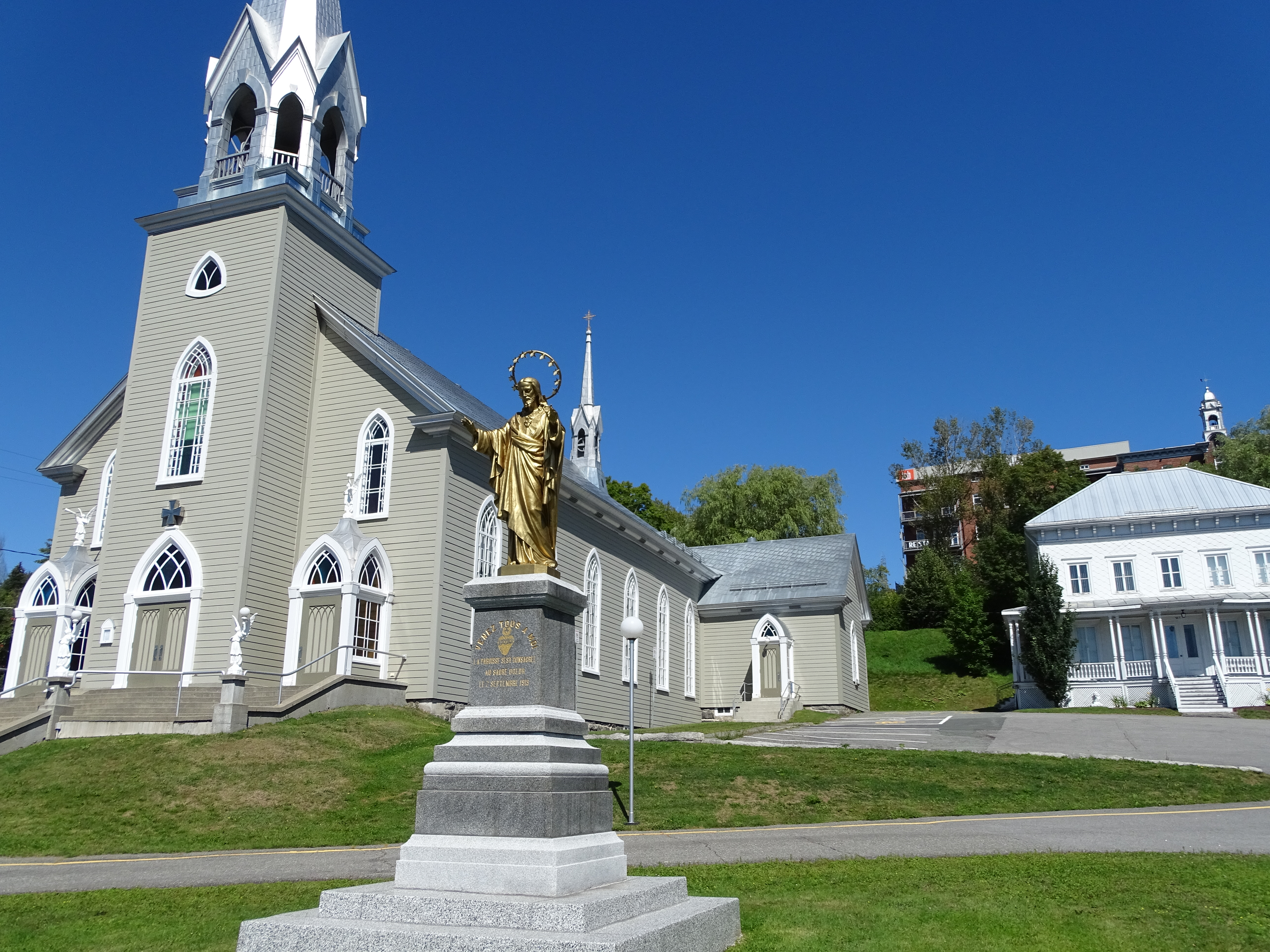 Église L'Enfant-Jésus (Vallée-Jonction)